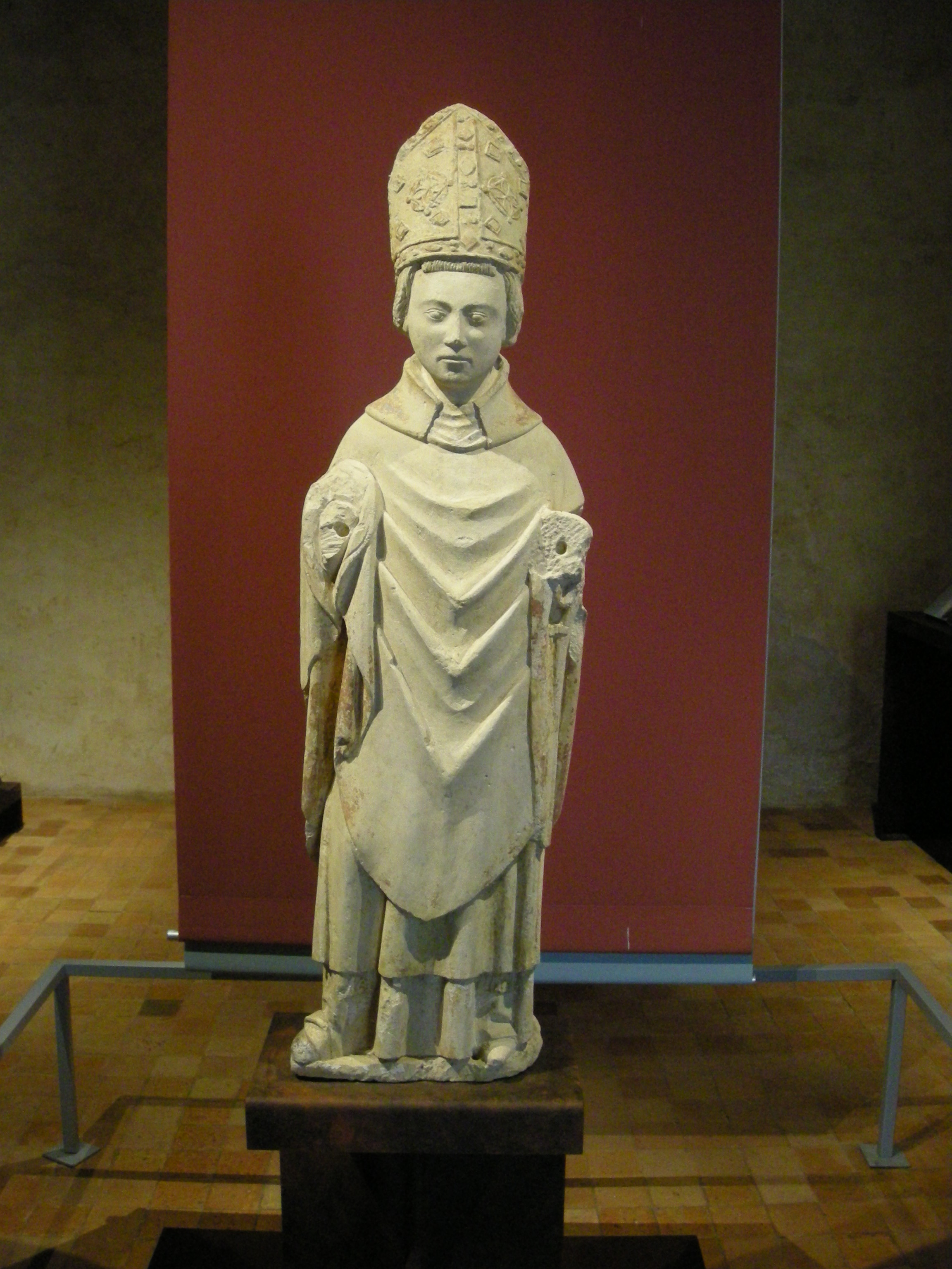 Statue restaurée de Saint Gerbold (XVe s.) en provenance de l'ermitage de Gratot, présentée dans le cadre de l'exposition "Fragments d'histoire" à l'abbaye de Hambye (Normandie)